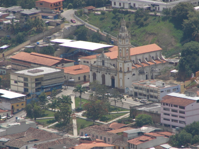 Imagen Mapas Consejos Comunales